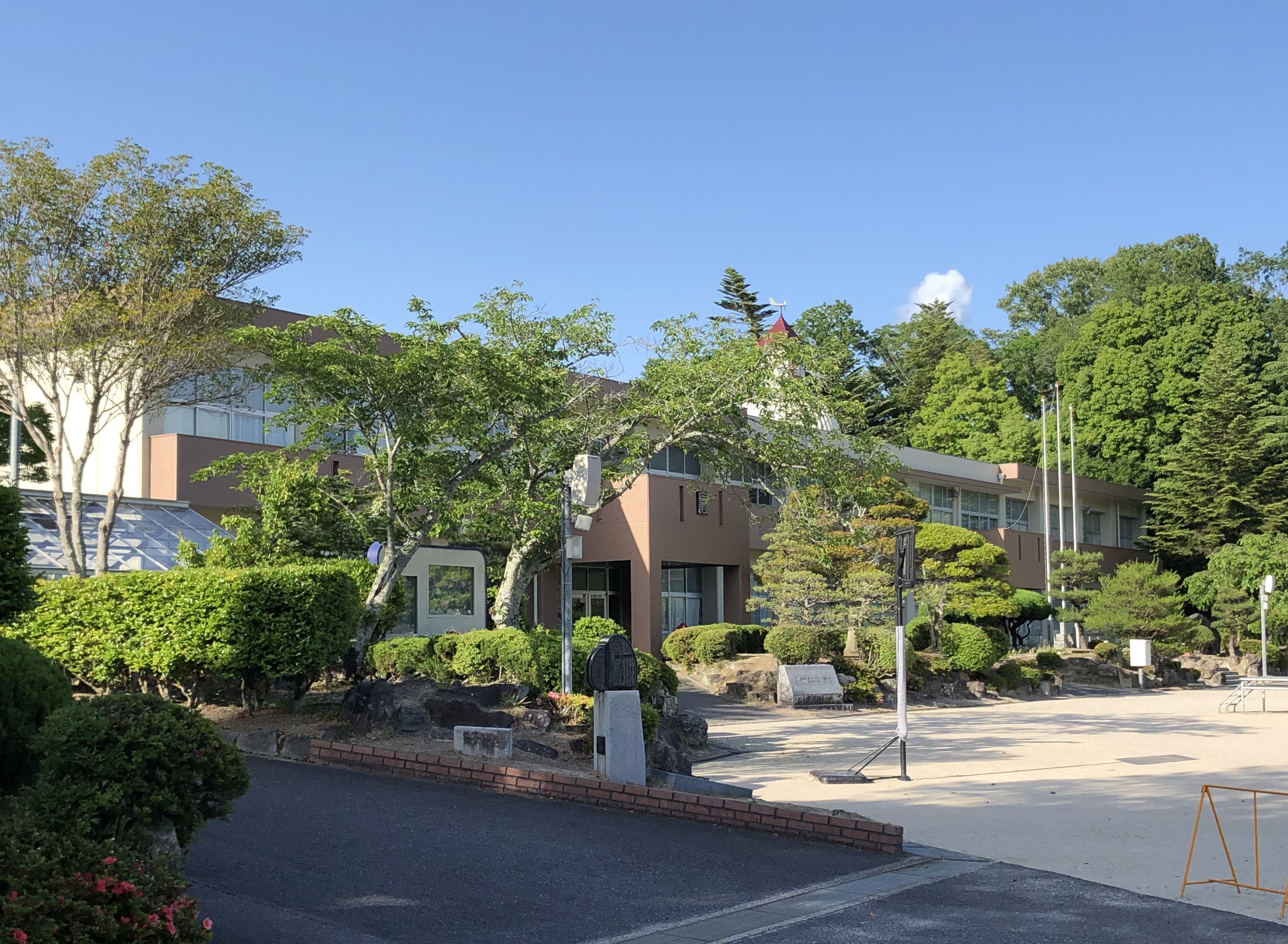 岡崎市立奥殿小学校（岡崎市奥殿町）